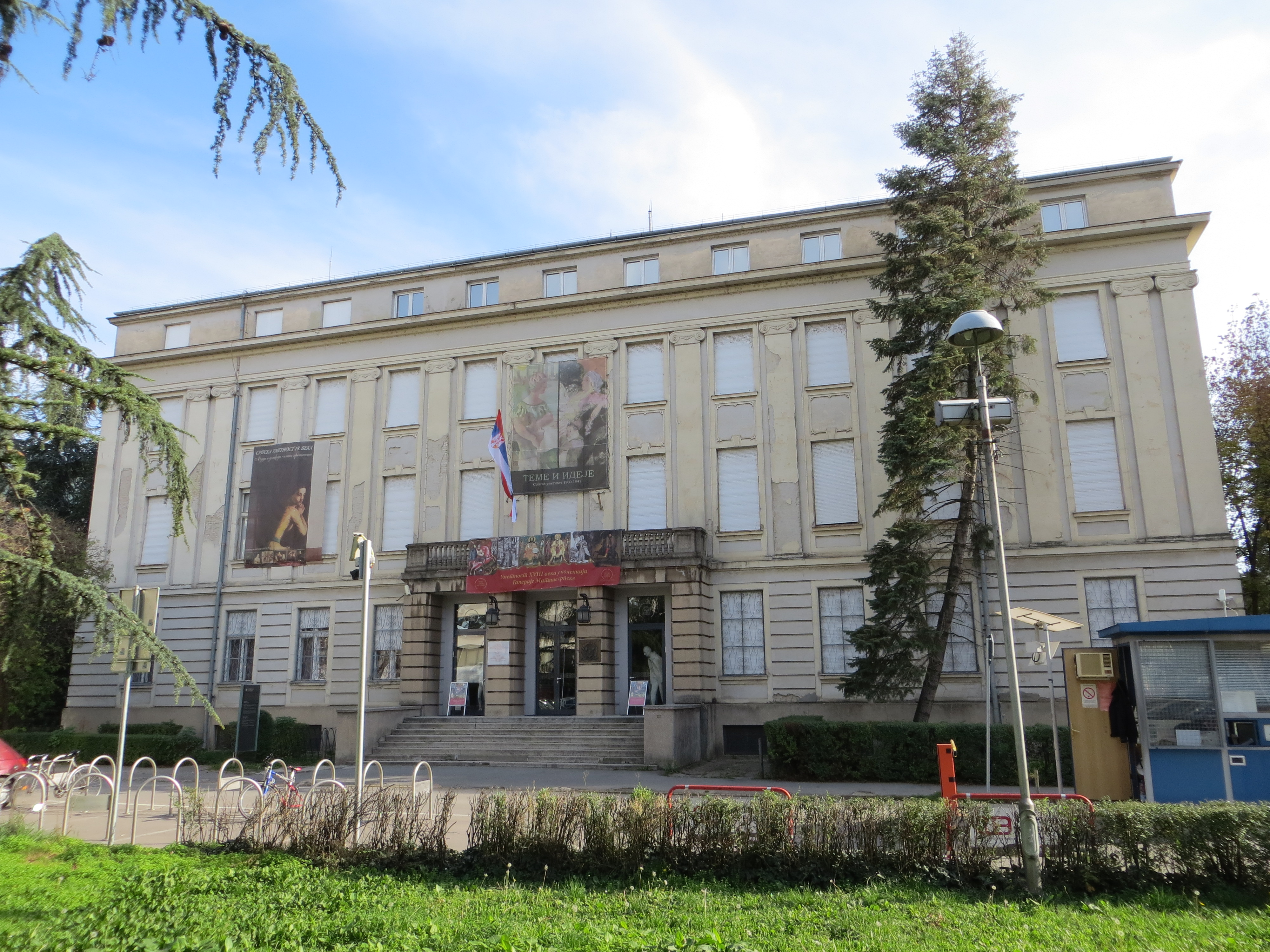 Galerija Matice Srpske